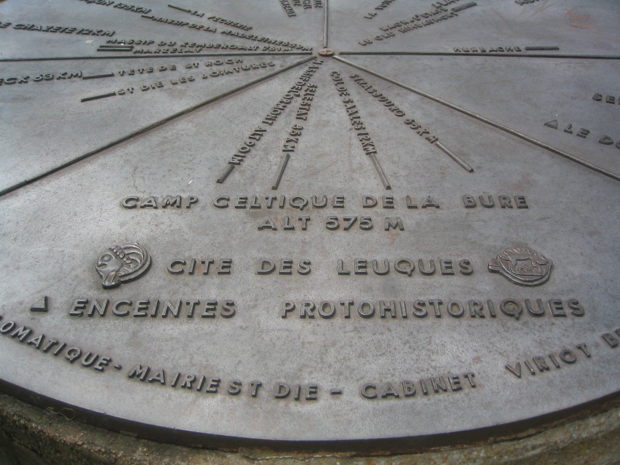 Table d'orientation au Camp celtique de la Bure (Saint-Dié-des-Vosges)